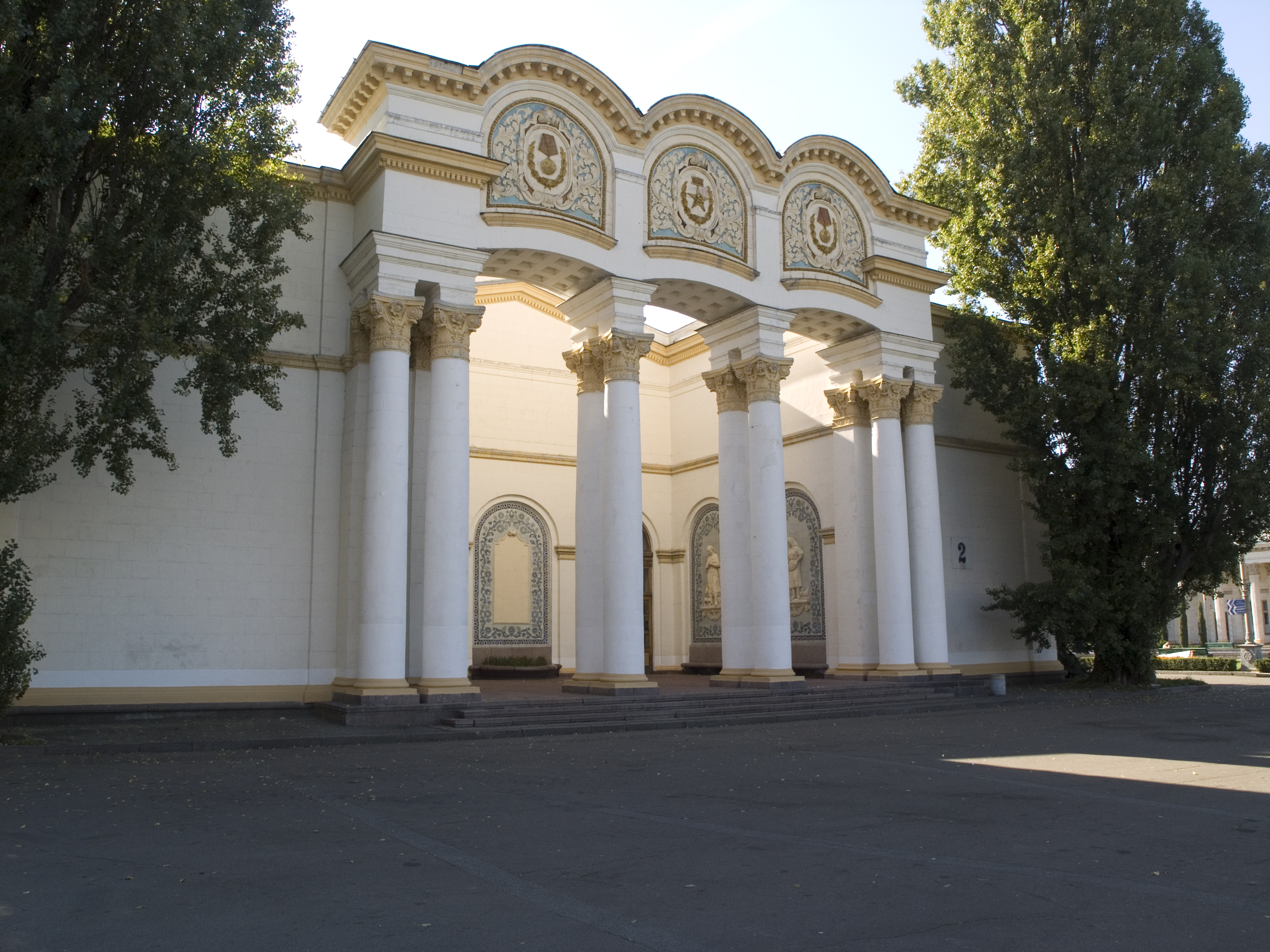 Україна, Київ - Виставка досягнень народного господарства УРСР - Павильон 2 "Тваринництво"